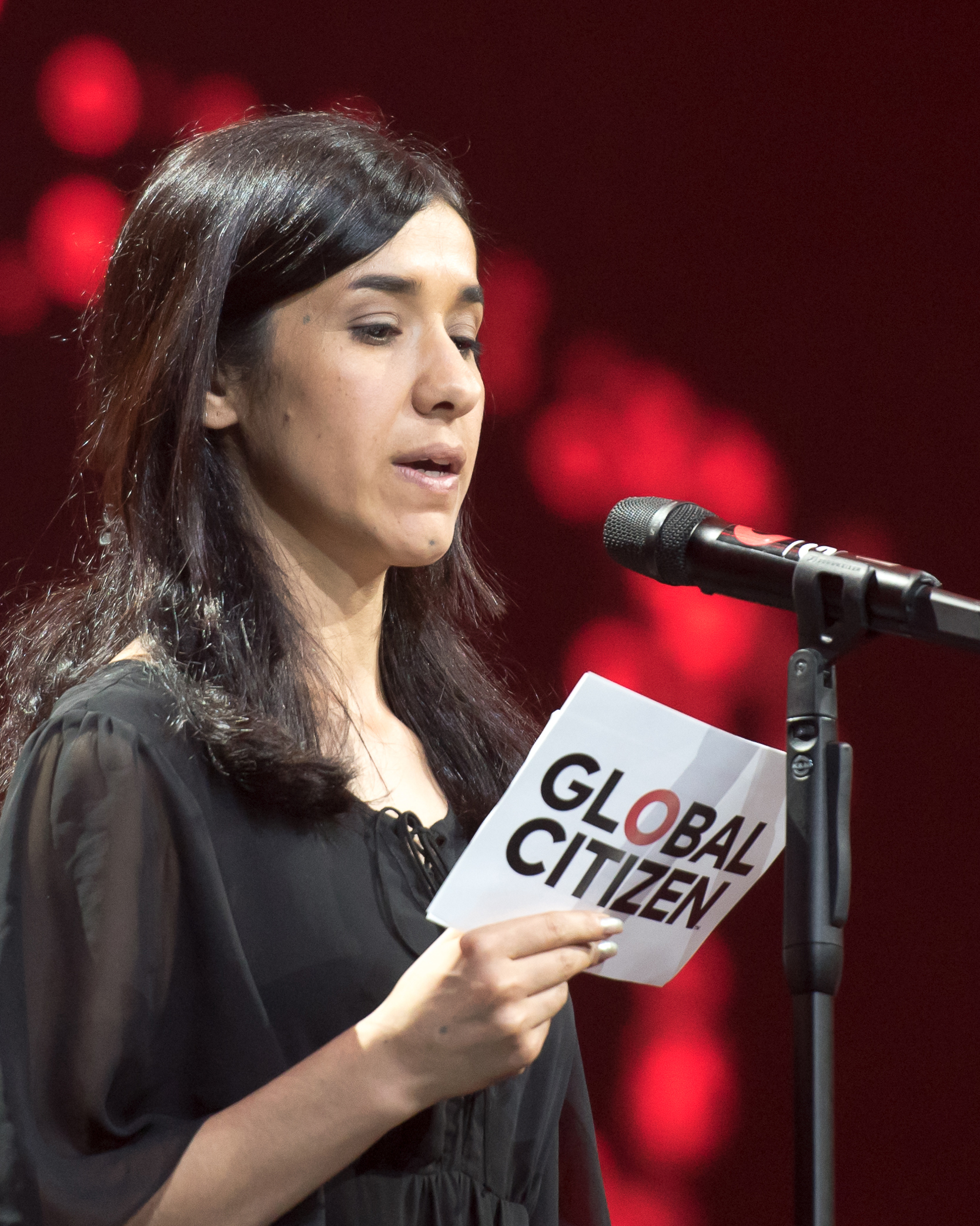 Nadia Murad ' beim Global Citizen Festival in Hamburg